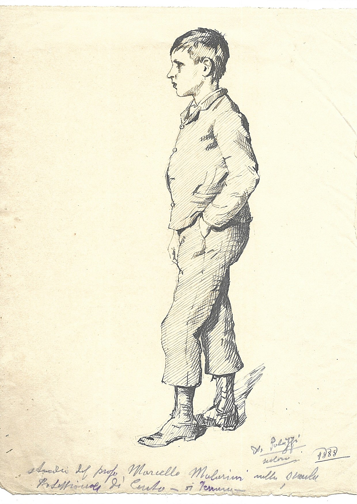 Disegno a penna datato 1888 con dedica: "A. Palazzi scolaro 1888 - studio del Prof. Marcello Mallarini nella scuola Professionale di Cento - di Ferrara". Proprietà di Antonio Mosca.